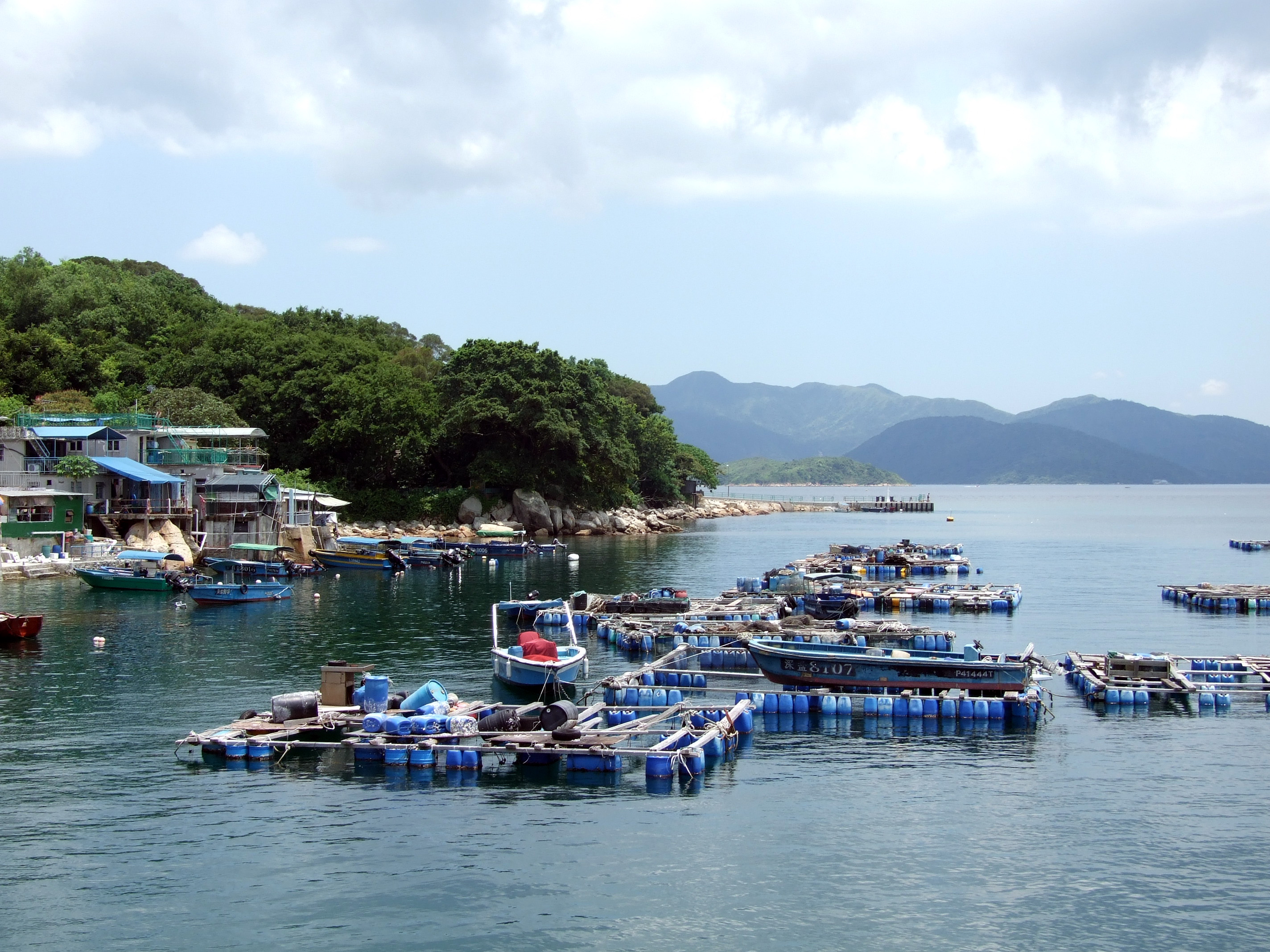 中文（香港）: 塔門魚類養殖區